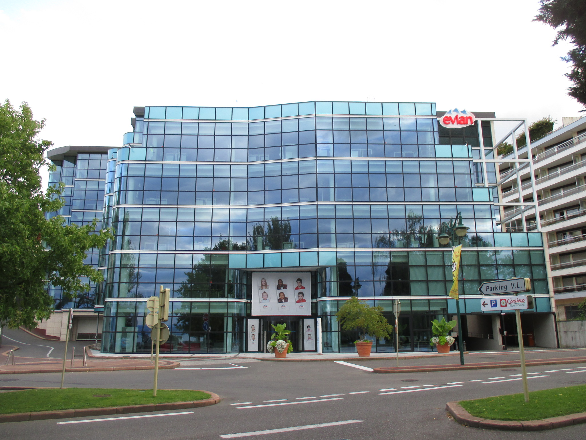 Locaux Evian à Evian